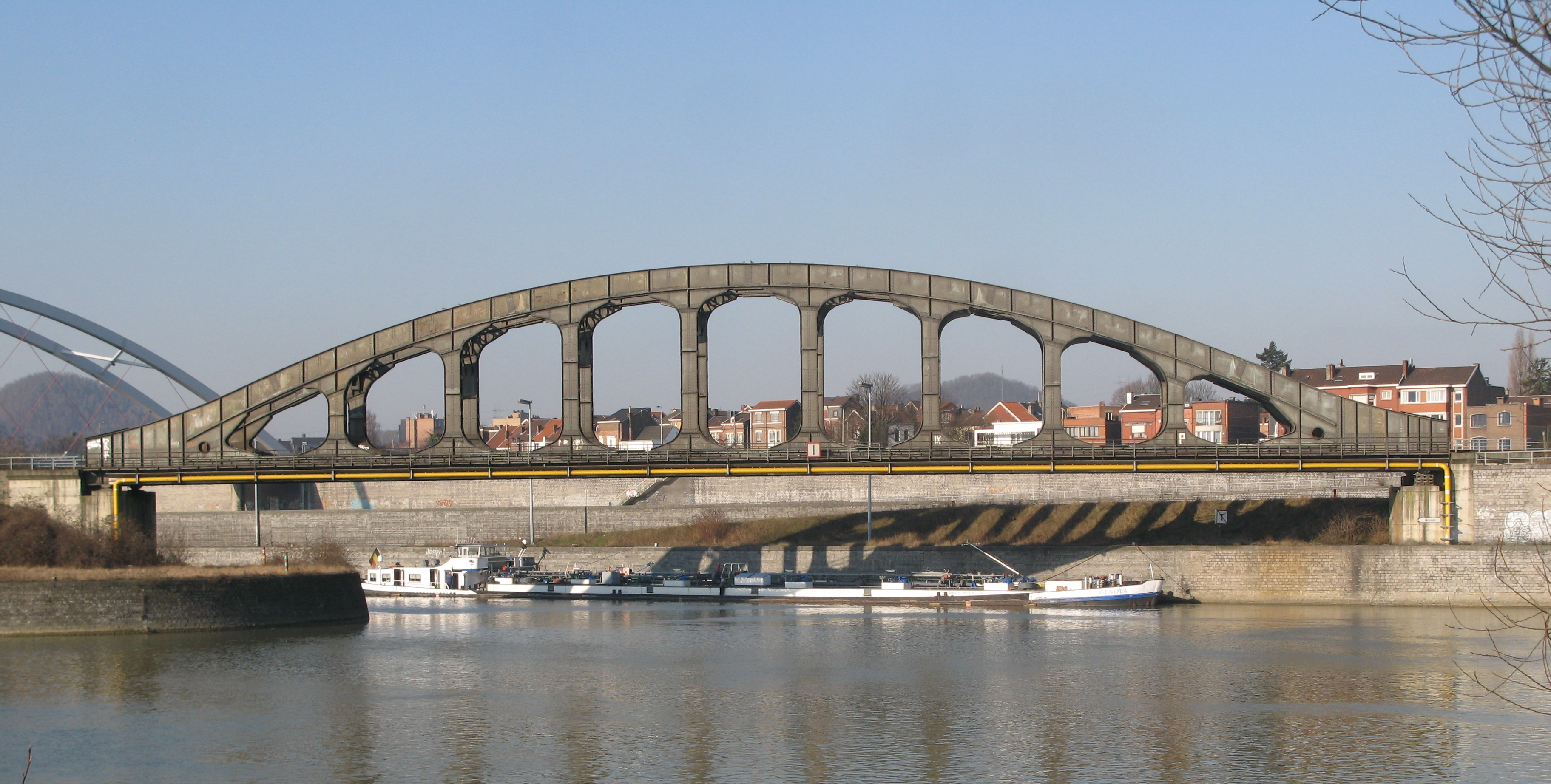 Vierendeelbréck (Monsinbréck) iwwer de Monsinkanal am Hafe vu Léck. Vierendeelbréck Hafe Léck Vierendeelbréck Hafe Léck